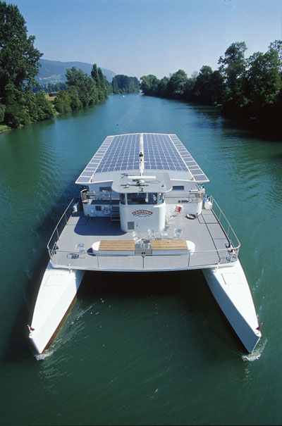 Solarkatamaran MobiCat